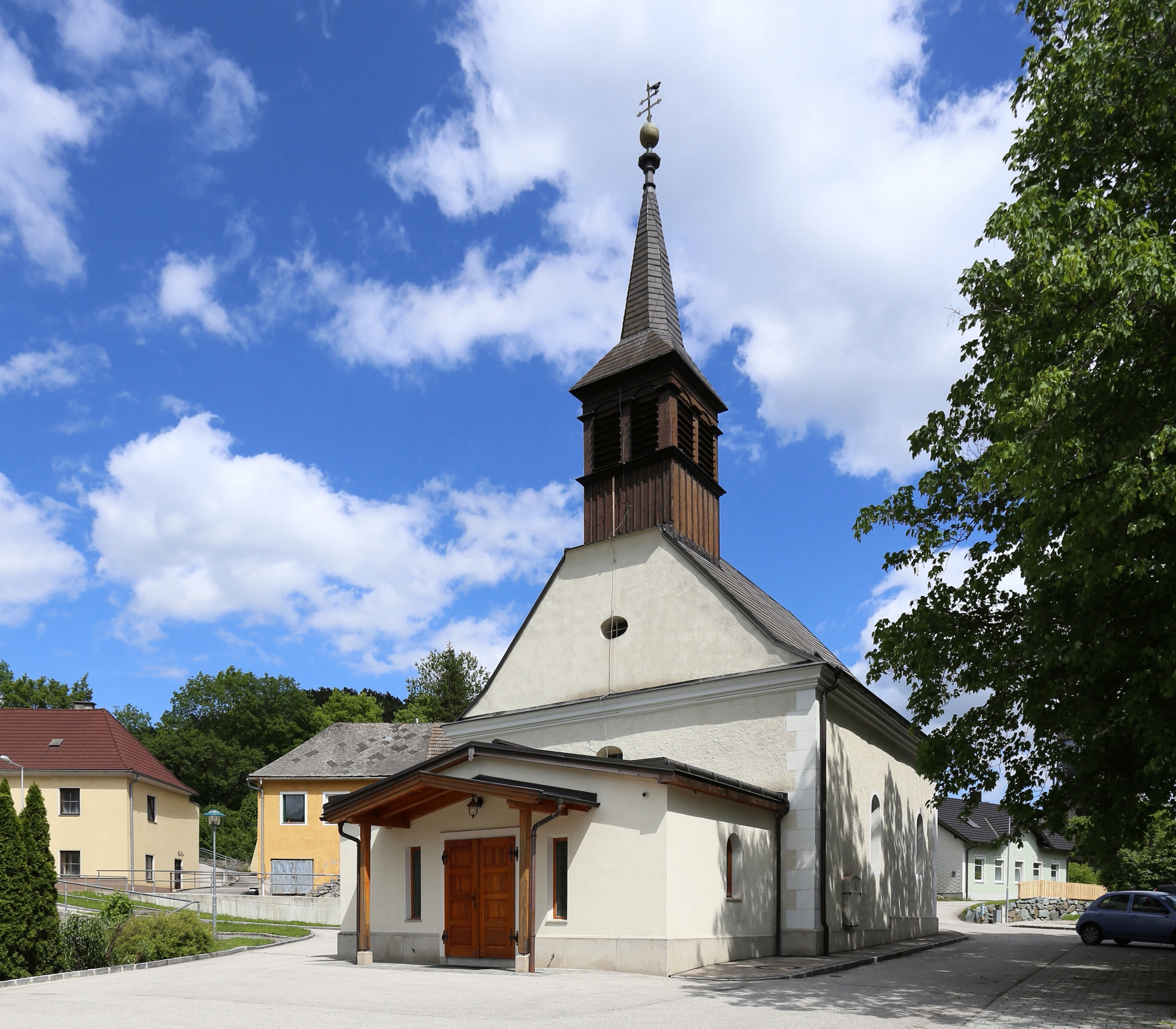 Die röm.-kath. Pfarrkirche Zur schmerzhaften Mutter Gottes in Wopfing, ein Ortsteil der niederösterreichischen Marktgemeinde Waldegg. Die kleine Saalkirche hat ein kurzes barockes Langhaus, das 1730/33 errichtet wurde. Der eingezogene, gotische Chor mit Spitzbogenfenstern stammt aus dem 14. Jahrhundert. Ende des 19. Jahrhundert wurde der hölzerne Dachreiter aufgesetzt und Rundbogenfenster im Langhaus eingebaut. 1999/2000 kam der Eingangsvorbau hinzu.